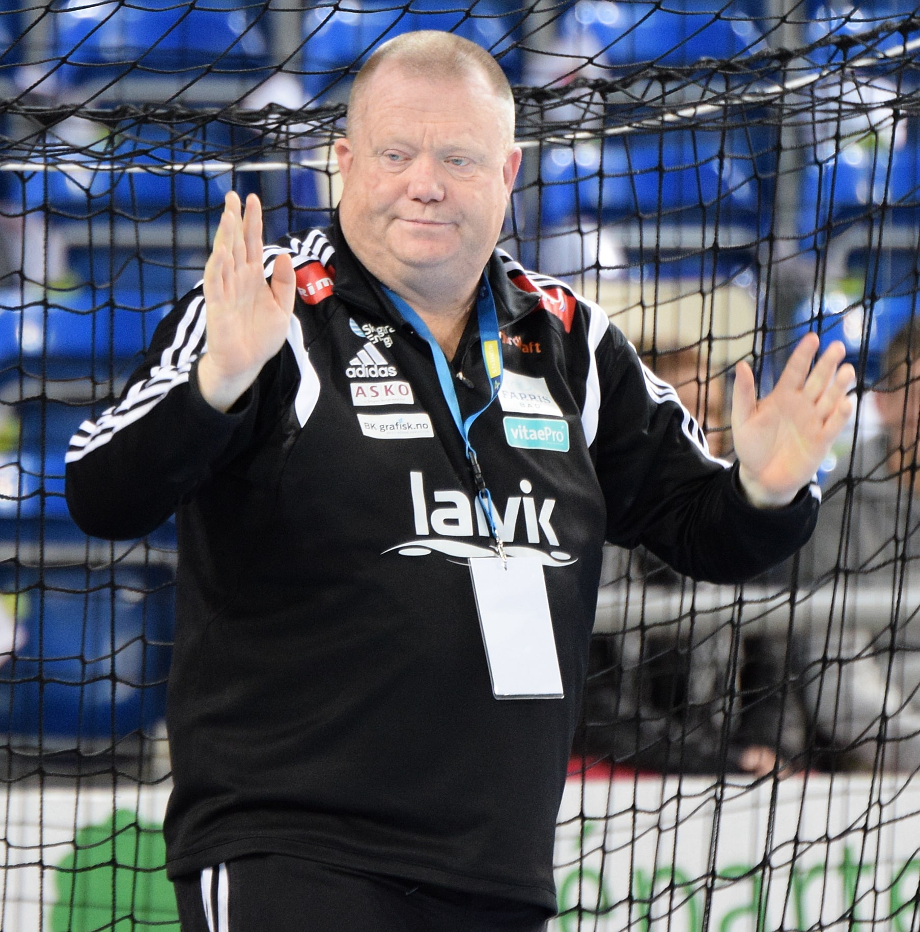 Lors de la rencontre de Ligue des champions entre Metz Handball et Larvik HK. A Metz, le 15 novembre 2014.